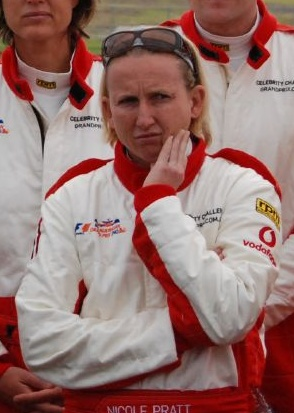 Nicole Pratt